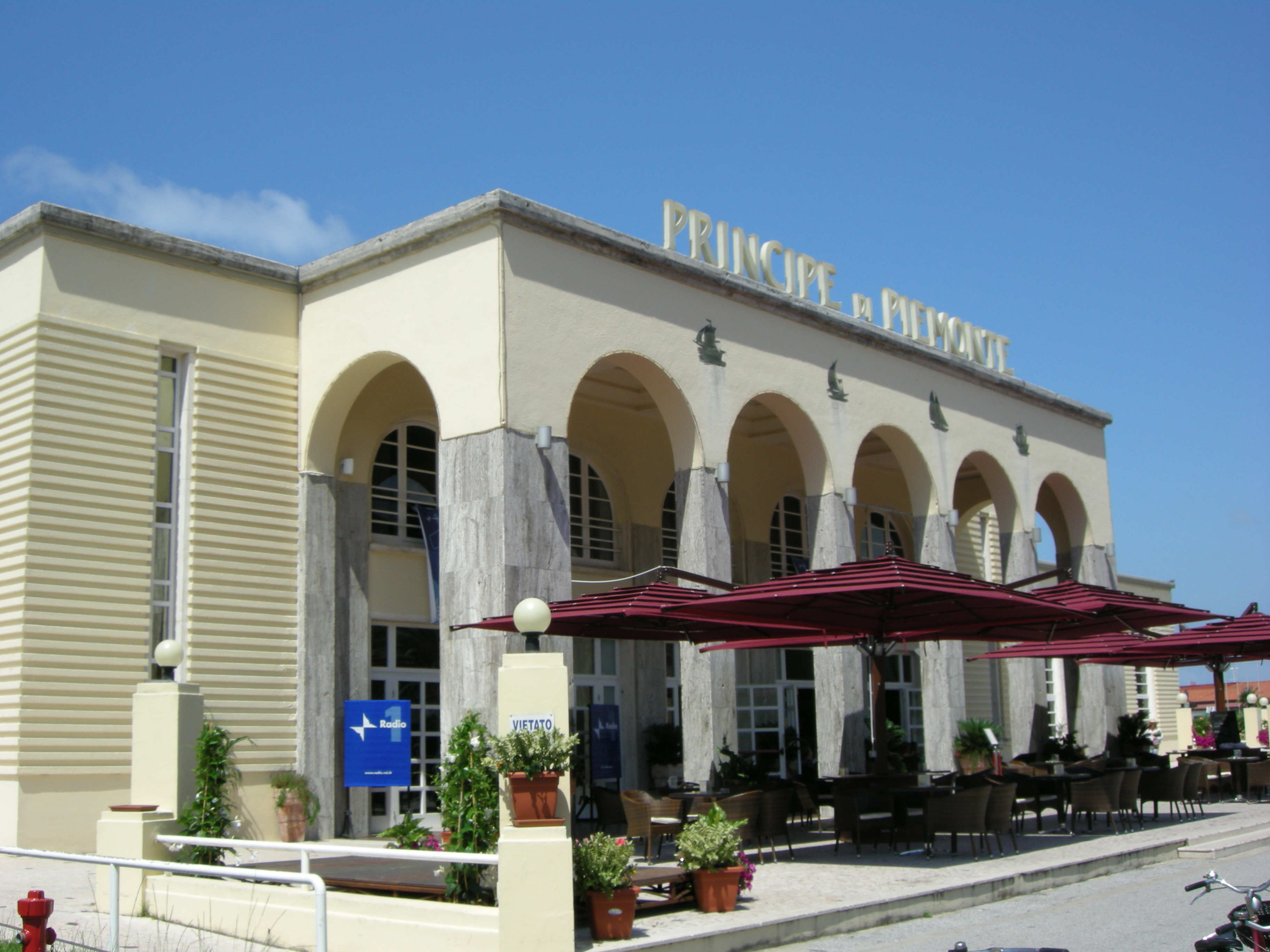 Bagno principe di piemonte